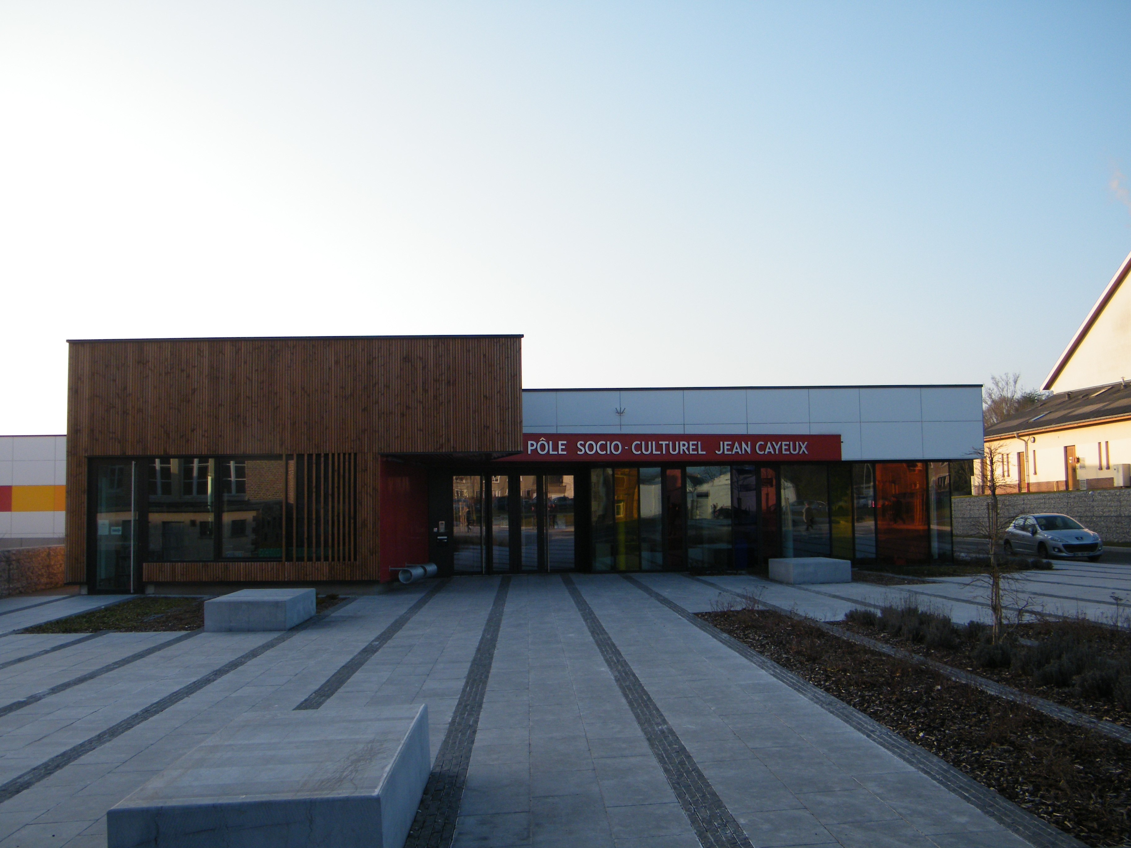 Rivery, Somme, fr, Pôle socio-culturel Jean Cayeux